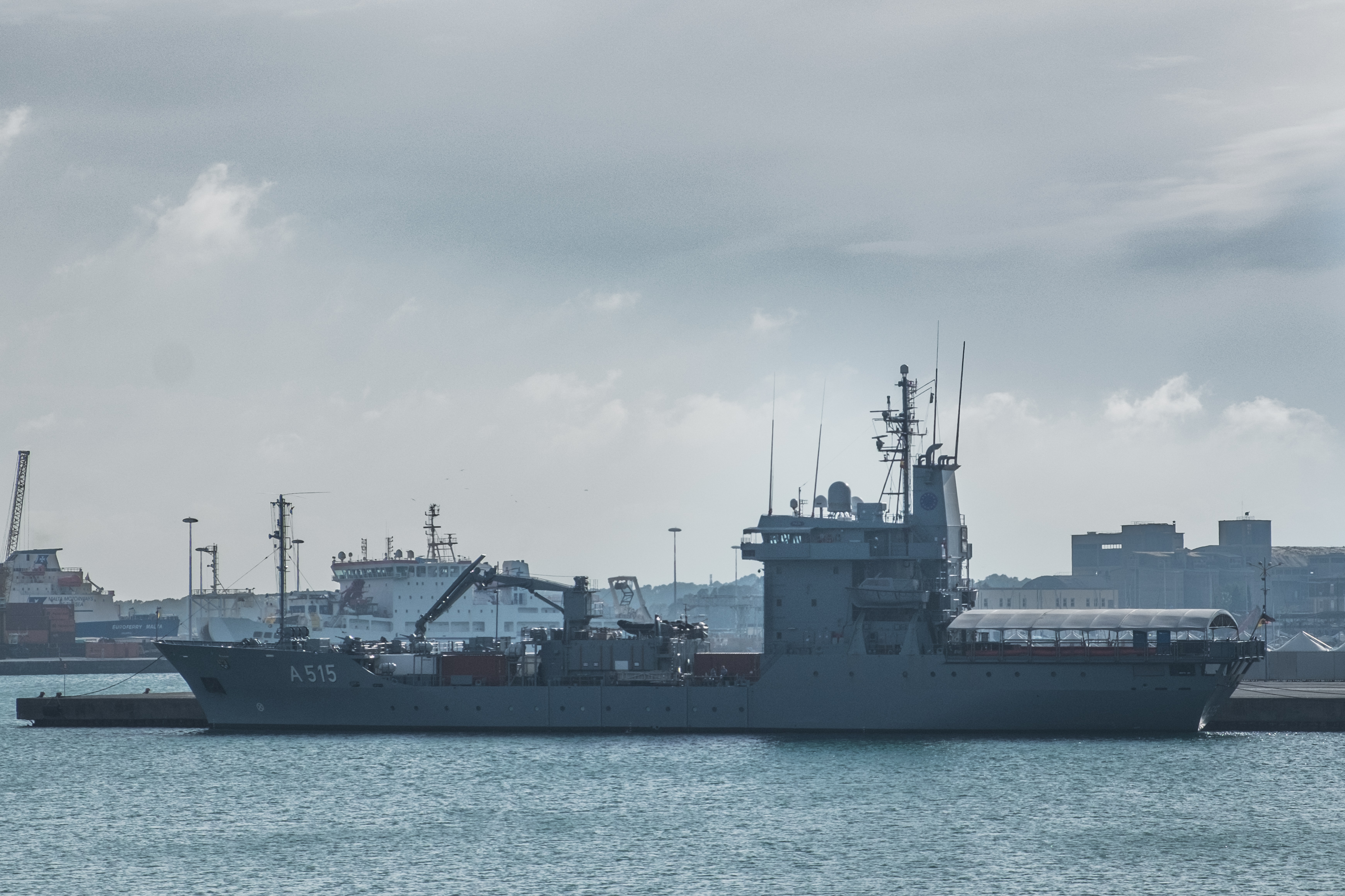 La nave tedesca A515